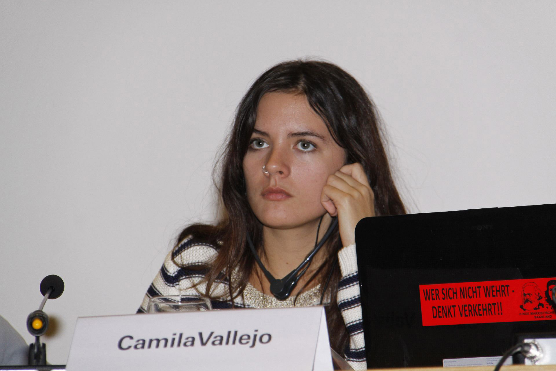 Aufstand für gerechte Bildung in Chile. Abschlussveranstaltung der Rundreise mit AkteurInnen der Protestbewegung. 8.2.2012, Berlin Mit Camila Vallejo, Vize-Präsidentin der Federación de Estudiantes de la Universidad de Chile (Studentenvereinigung der Universität von Chile); Karol Cariola, Studentin, Generalsekretärin der Juventudes Comunistas de Chile (Kommunistischen Jugend); Jorge Murúa, Mitglied in der Leitung des Gewerkschaftsdachverbandes Central Unitaria de Trabajadores de Chile (CUT); Andreas Keller, GEW; Paula Rauch, Die Linke.SDS; Moderation: Malte Daniljuk, Rosa-Luxemburg-Stiftung: Mehr zur Rundreise von Camila Vallejo, Jorge Murúa und Karol Cariola